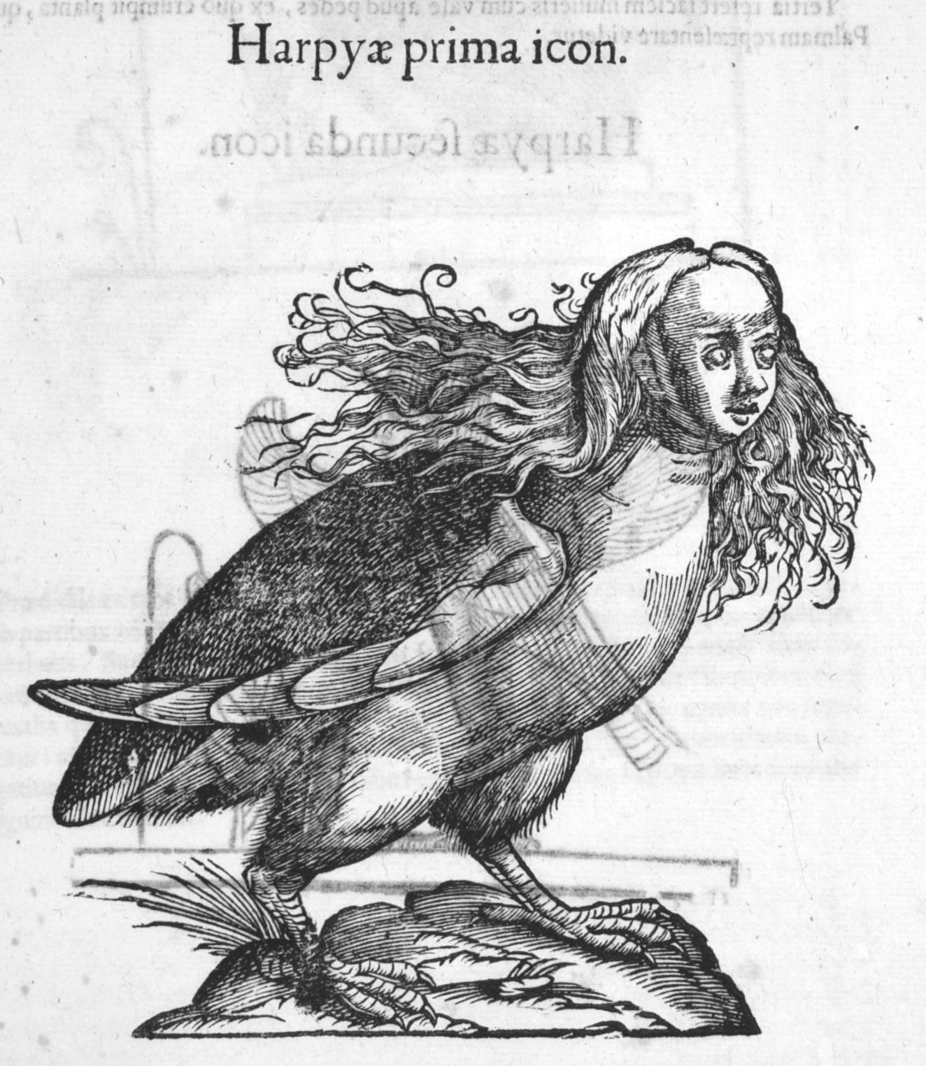 Harpie. Monstrorum historia d'Ulisse Androvandi, p. 337